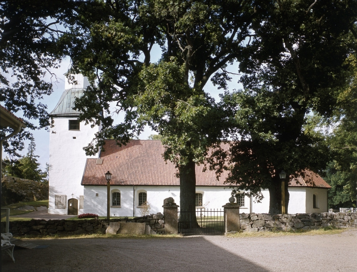 Stora Mellby kyrka